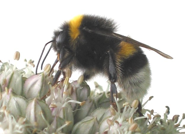 (Grote aardhommel op prei (Bombus magnus on Allium porrum .